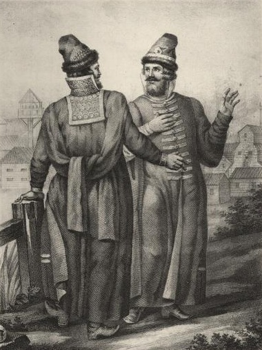 Русская одежда в XIV до XVIII столетия, охобень и шапка.